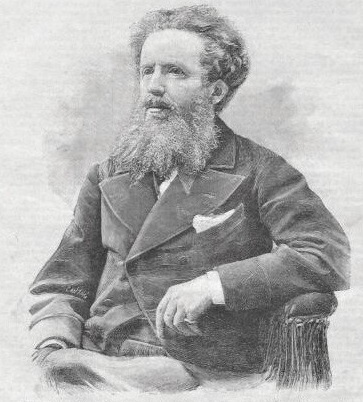 Luigi Capranica, incisione